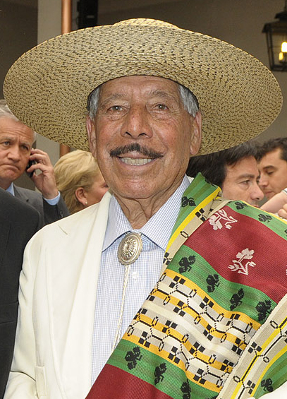 Eleodoro Campos, folclorista chileno.